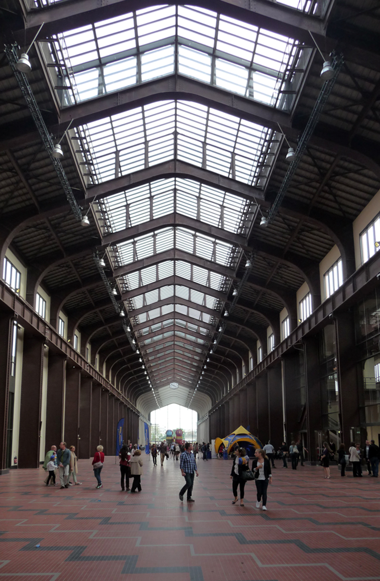 Cité du cinéma à Saint-Denis (Seine-Saint-Denis, Île-de-France, France).